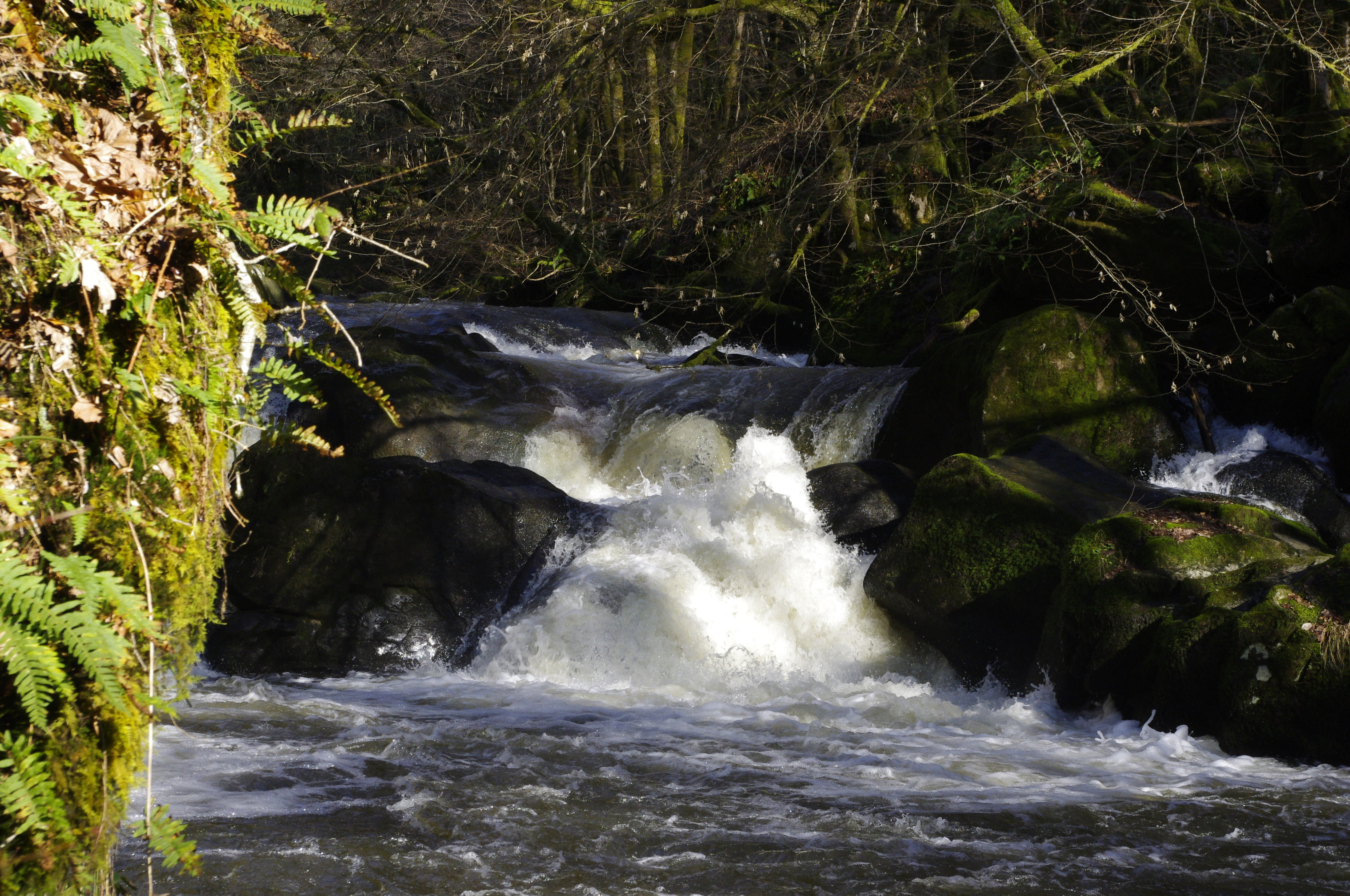 La Dronne en limite des communes de Champs-Romain et Saint-Saud-Lacoussière dans le Nord du département de la Dordogne. La cascade "Saut du Chalard".